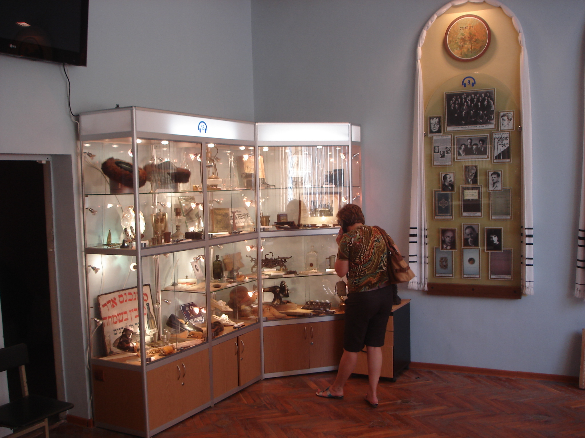 фрагмент експозиції музею